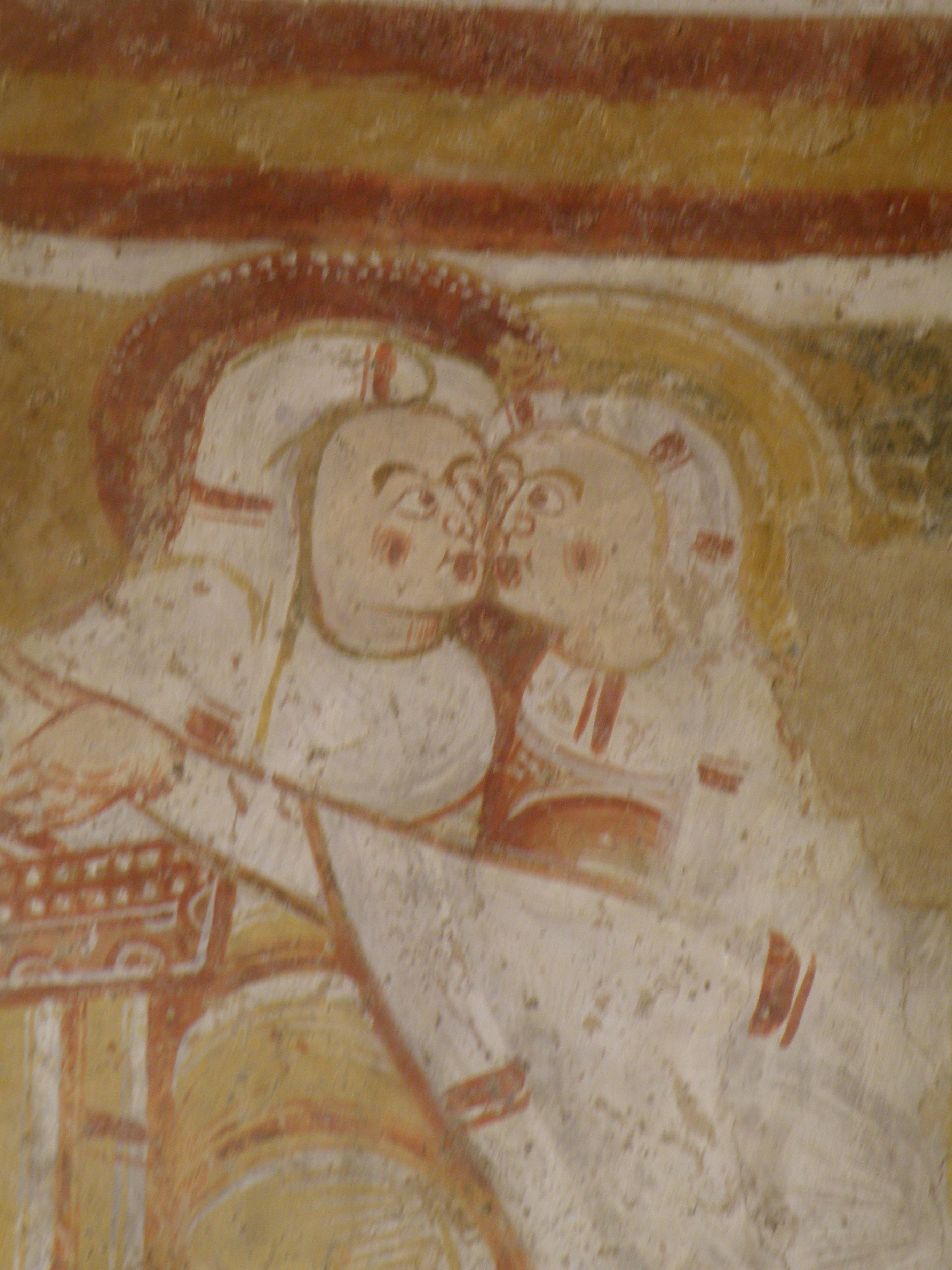 Église de Nohant-Vic. Élisabeth et Marie (extrait)